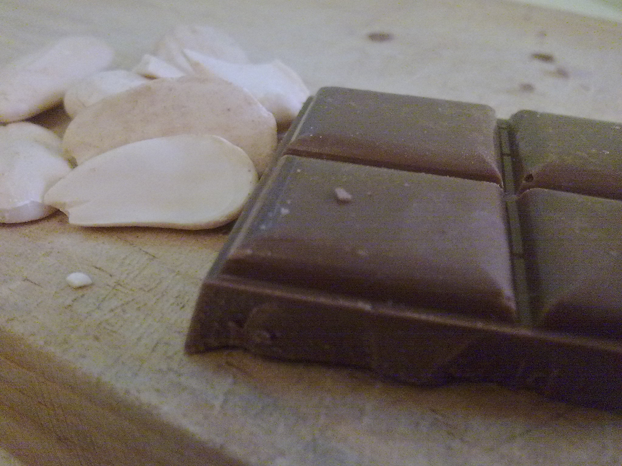 Chocolate y almendras.